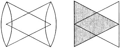 הקונוסים שבהם לפי ספרו של ייטס "חזון" נעות בשני כיוונים מנוגדים שתי ספירלות. (Gyres)